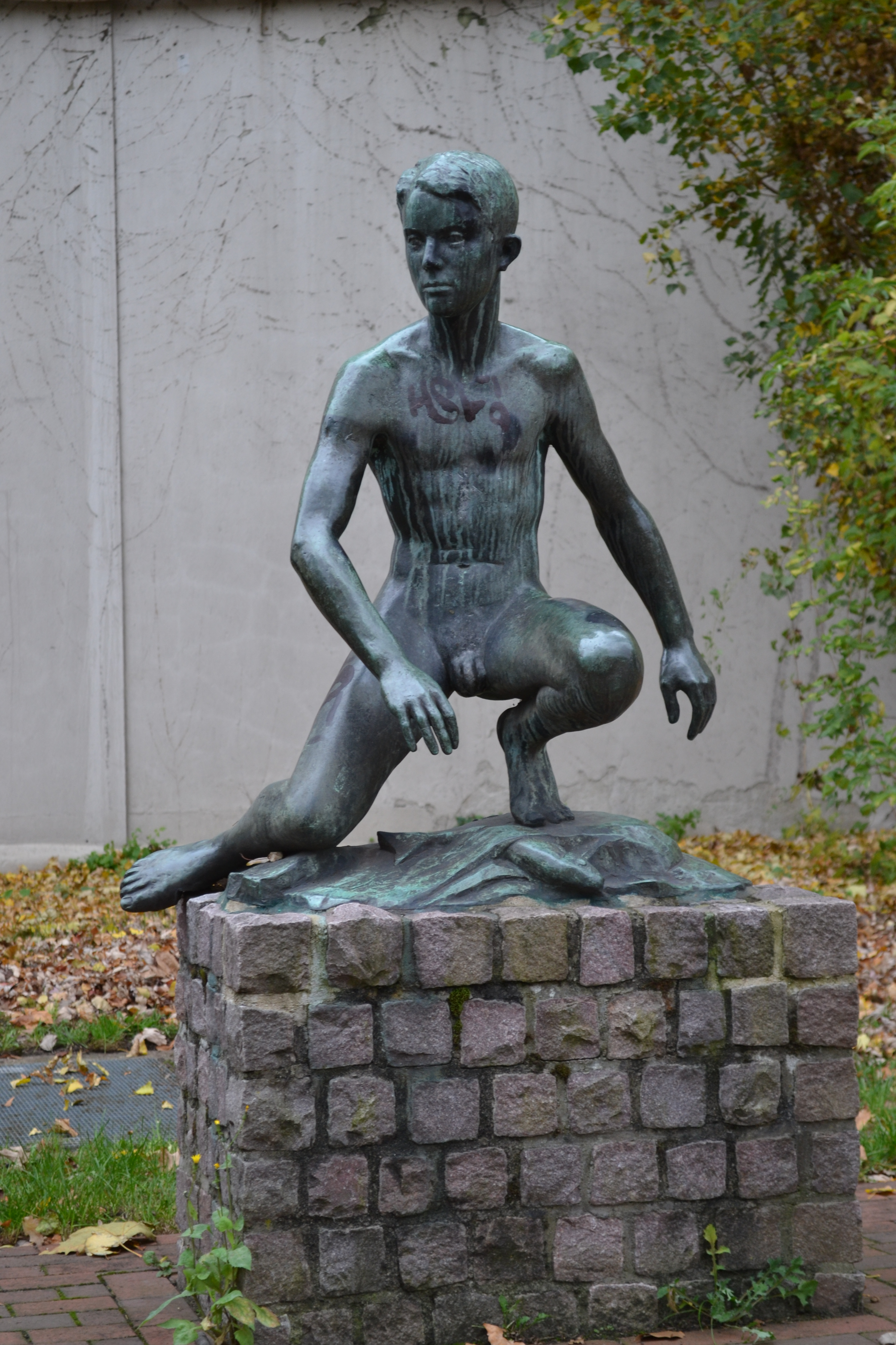 Bronzeplastik "Jüngling" von Ivo Beucker (1938) Schulhof des Humboldt-Gymnasiums Düsseldorf